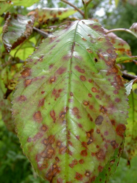 Blatt eines Kirschbaums, das mit Schrotschuss befallen ist